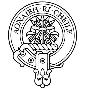 Badge au cimier du clan Cameron, privilège des membres du clan.